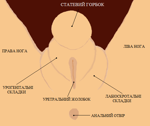 Статевий бугорок з навколишніми структурами у ембріона на 9-11 тижні